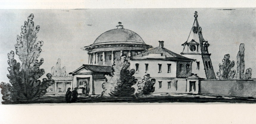 Троїцька церква: малюнок